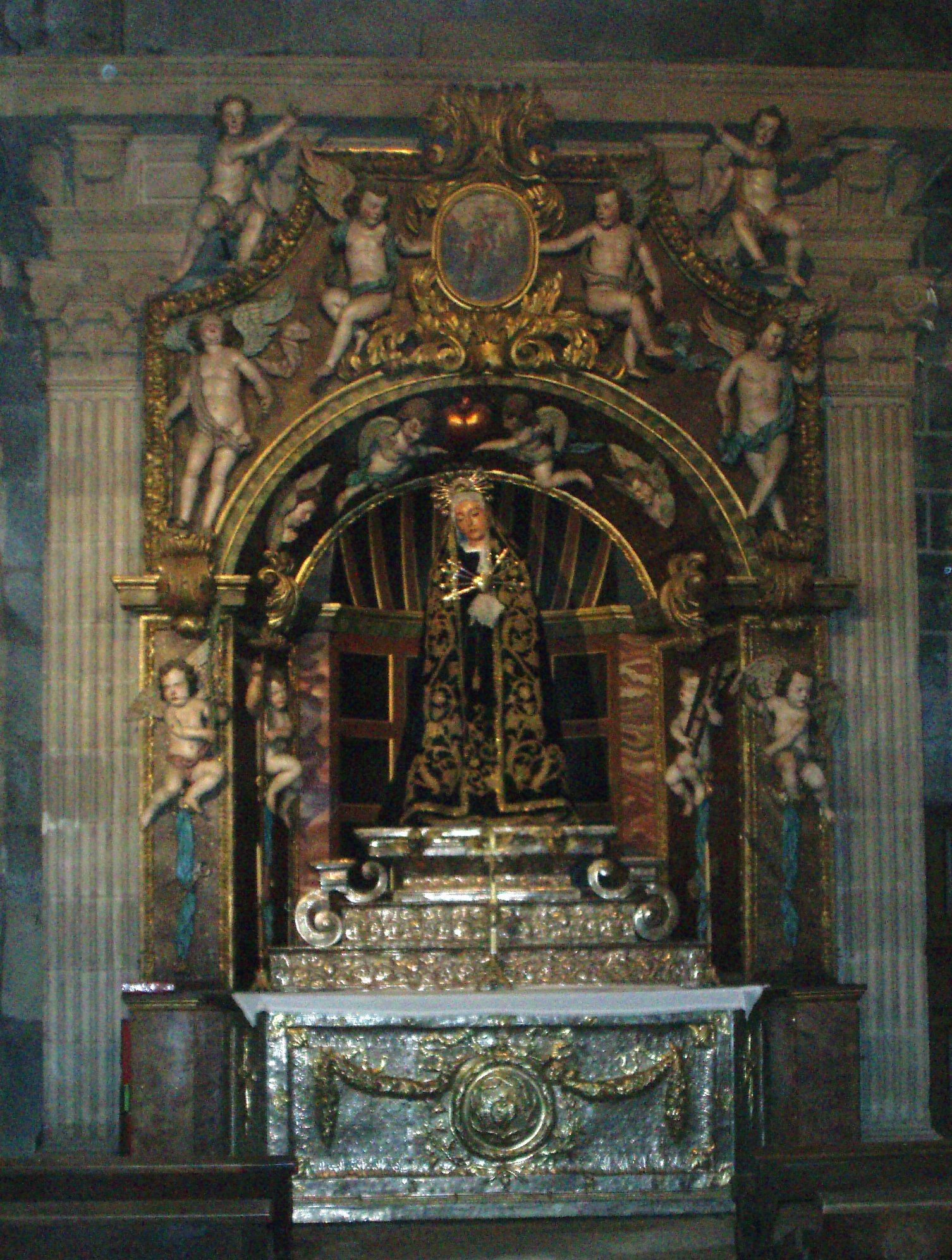 Virgen de la Soledad en la capilla del Espíritu Santo de la catedral de Santiago de Compostela